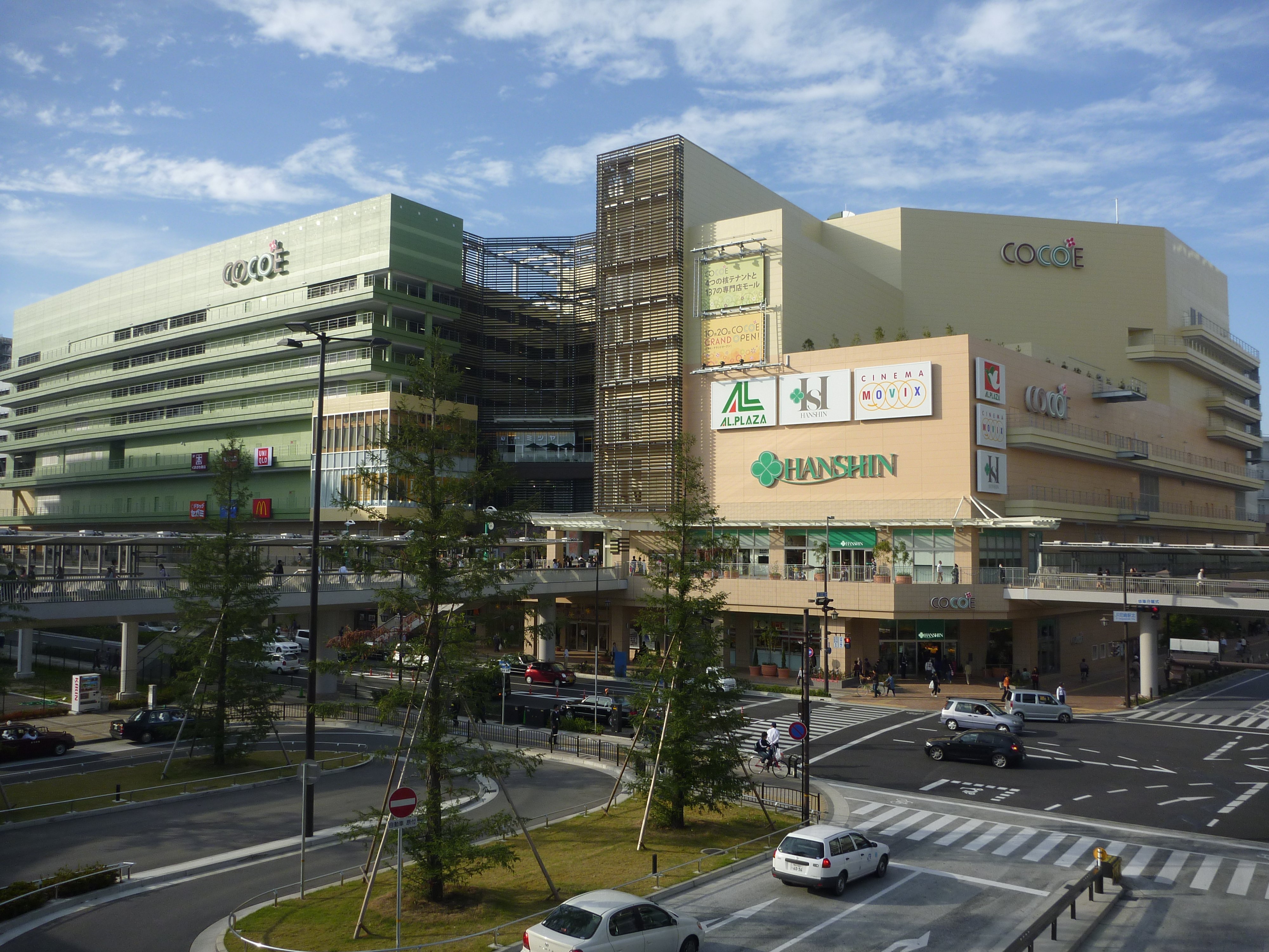 COCOE（2009年10月21日撮影）